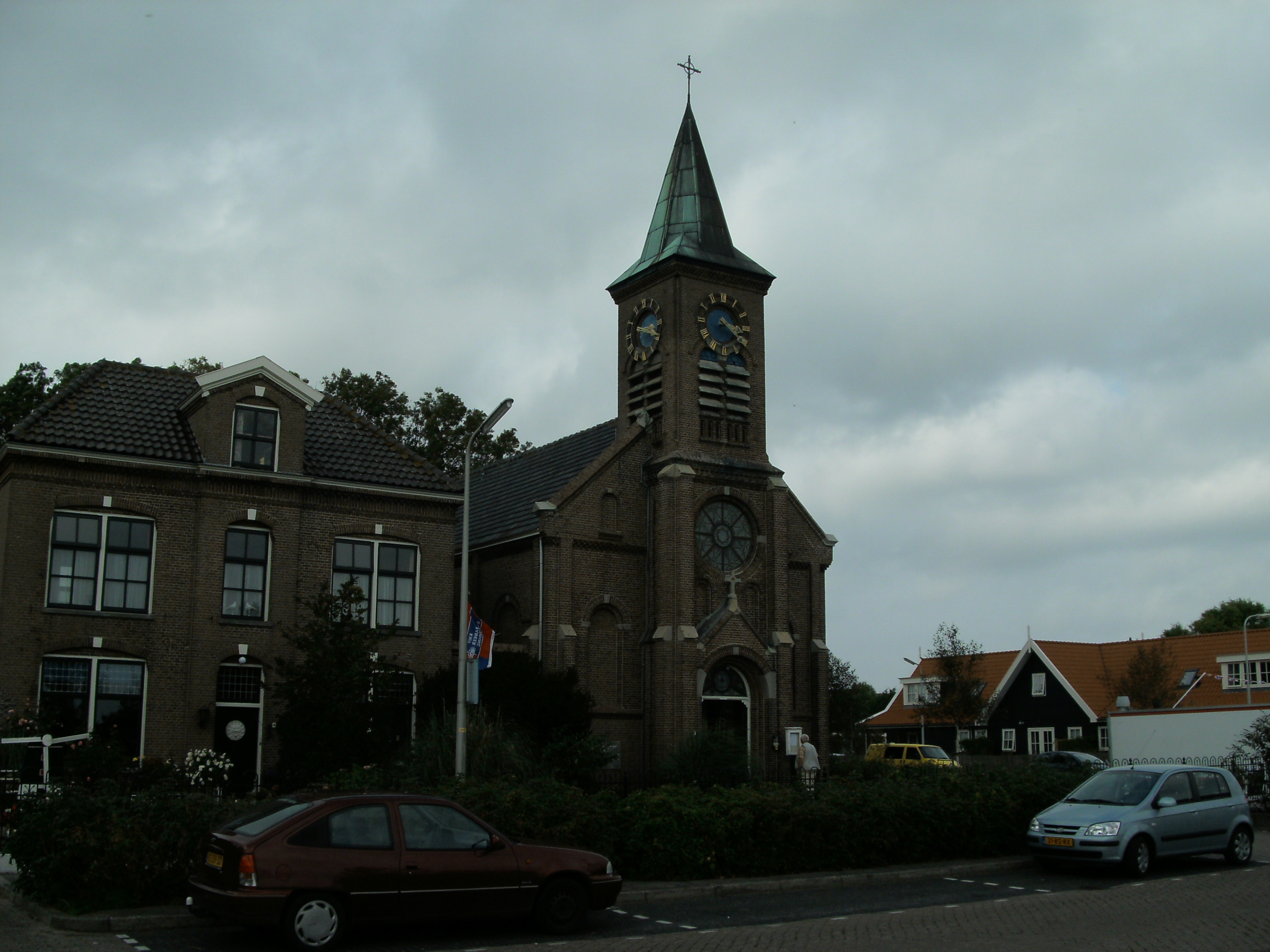 Gevel RK Kerk - Molenlaan 2, De Cocksdorp, Texel